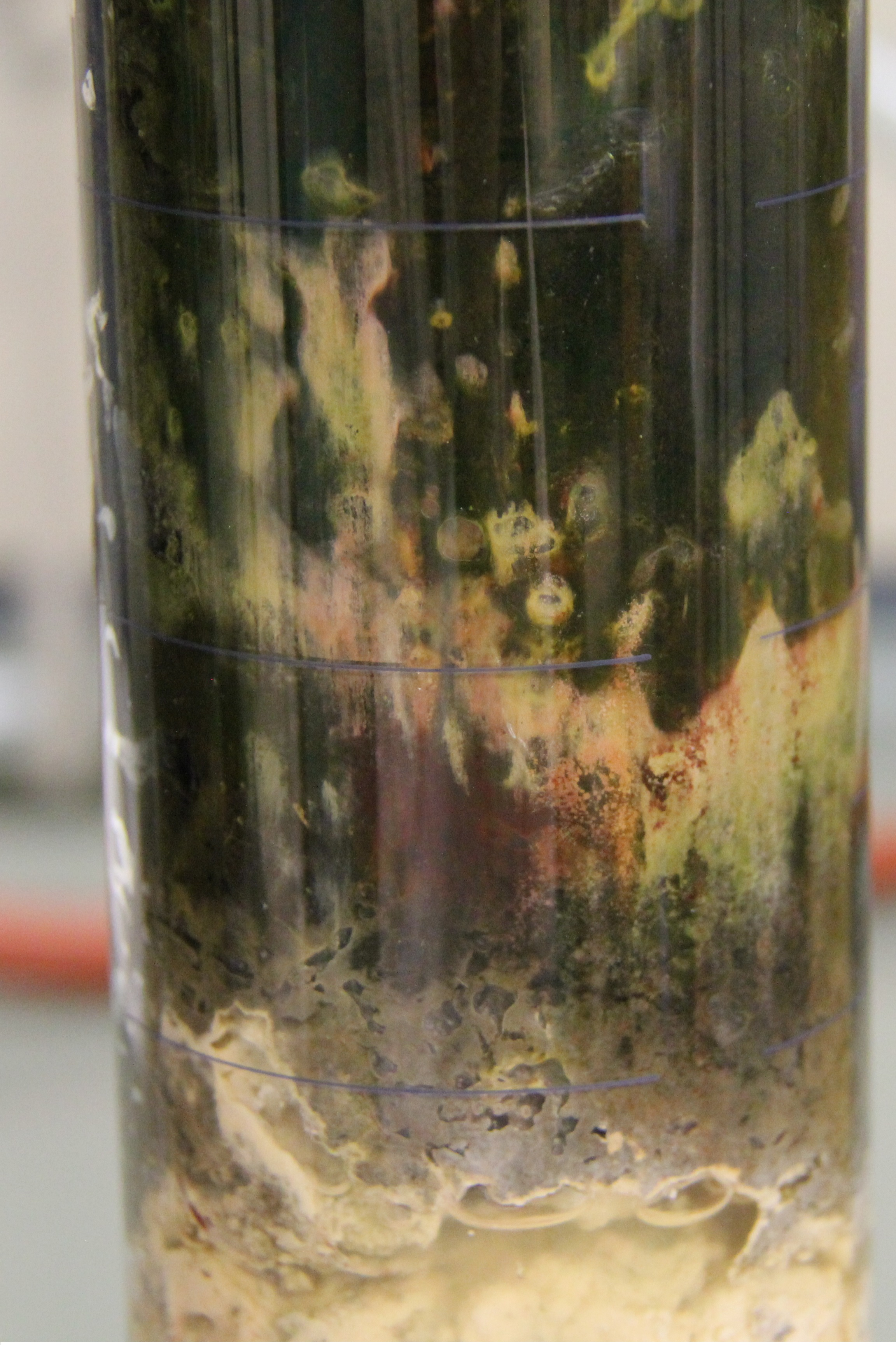 Winogradsky-Säule nach 17 Tagen Inkubation bei Raumtemperatur, Säule mit einer 40 W Lampe aus 30 cm Entfernung beleuchtet. In Rot sind Rhodospirillaceae zu erkennen.